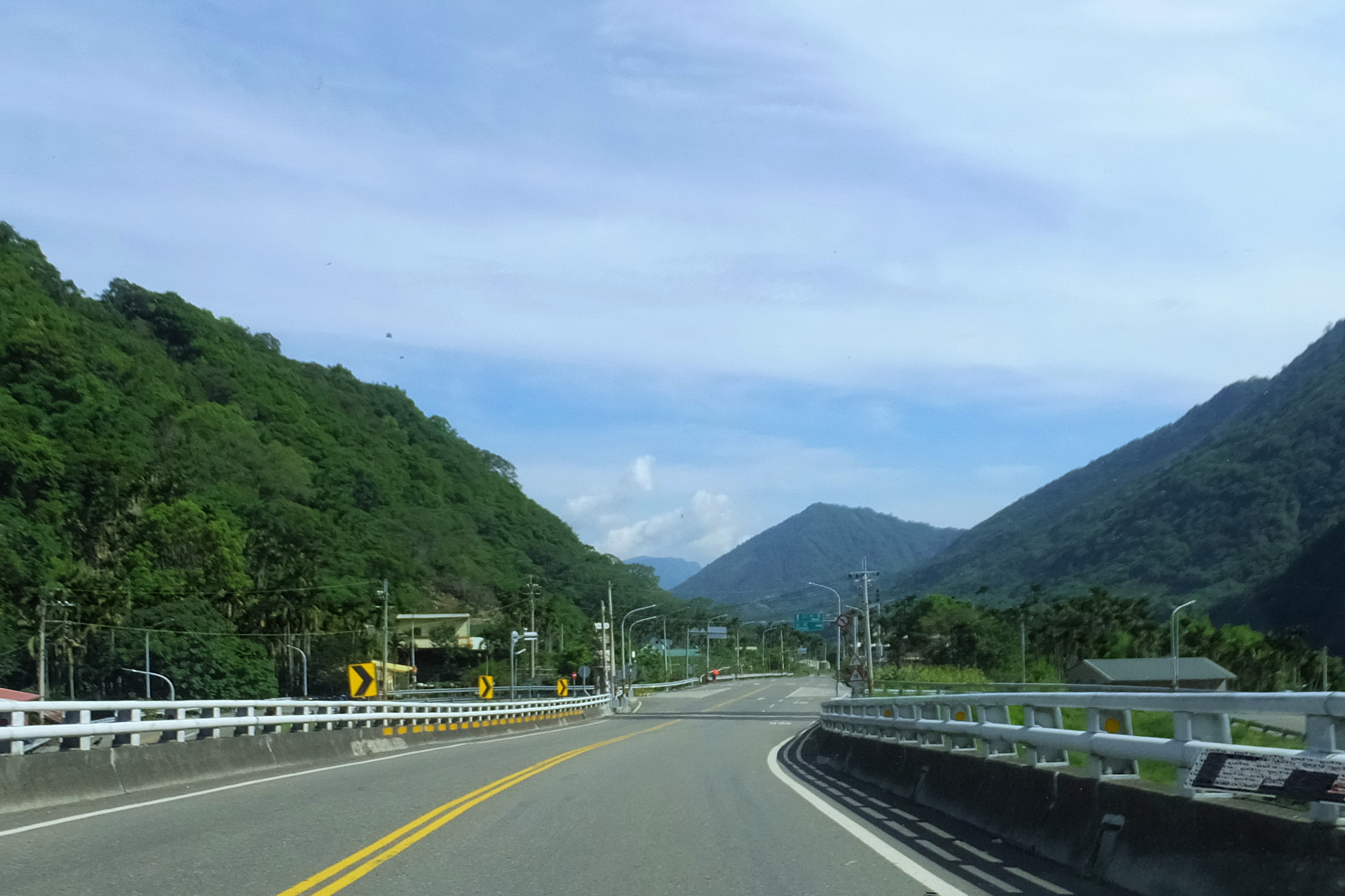 台21線 Taiwan Highway 21